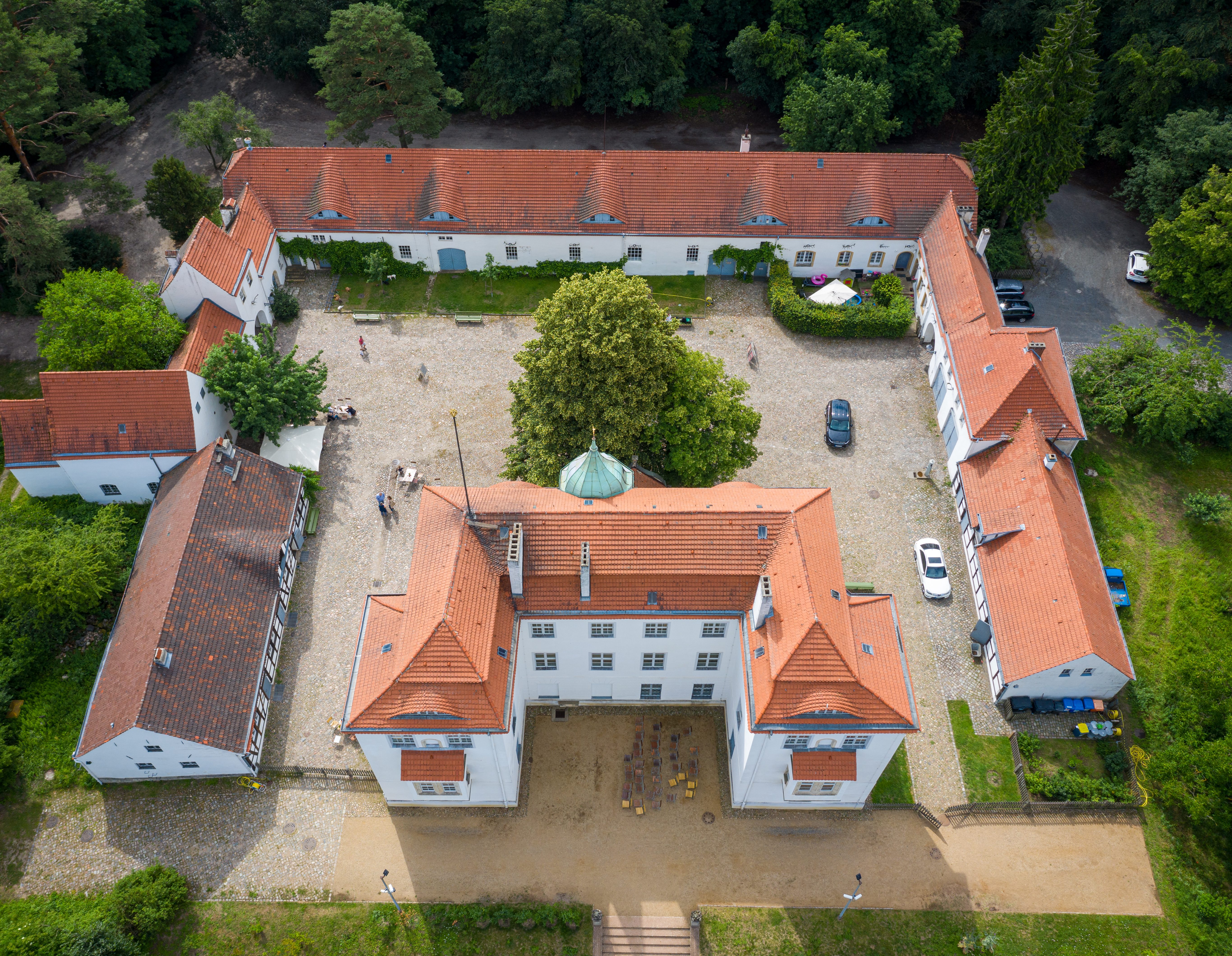 Jagdschloss Grunewald, Blick von oben